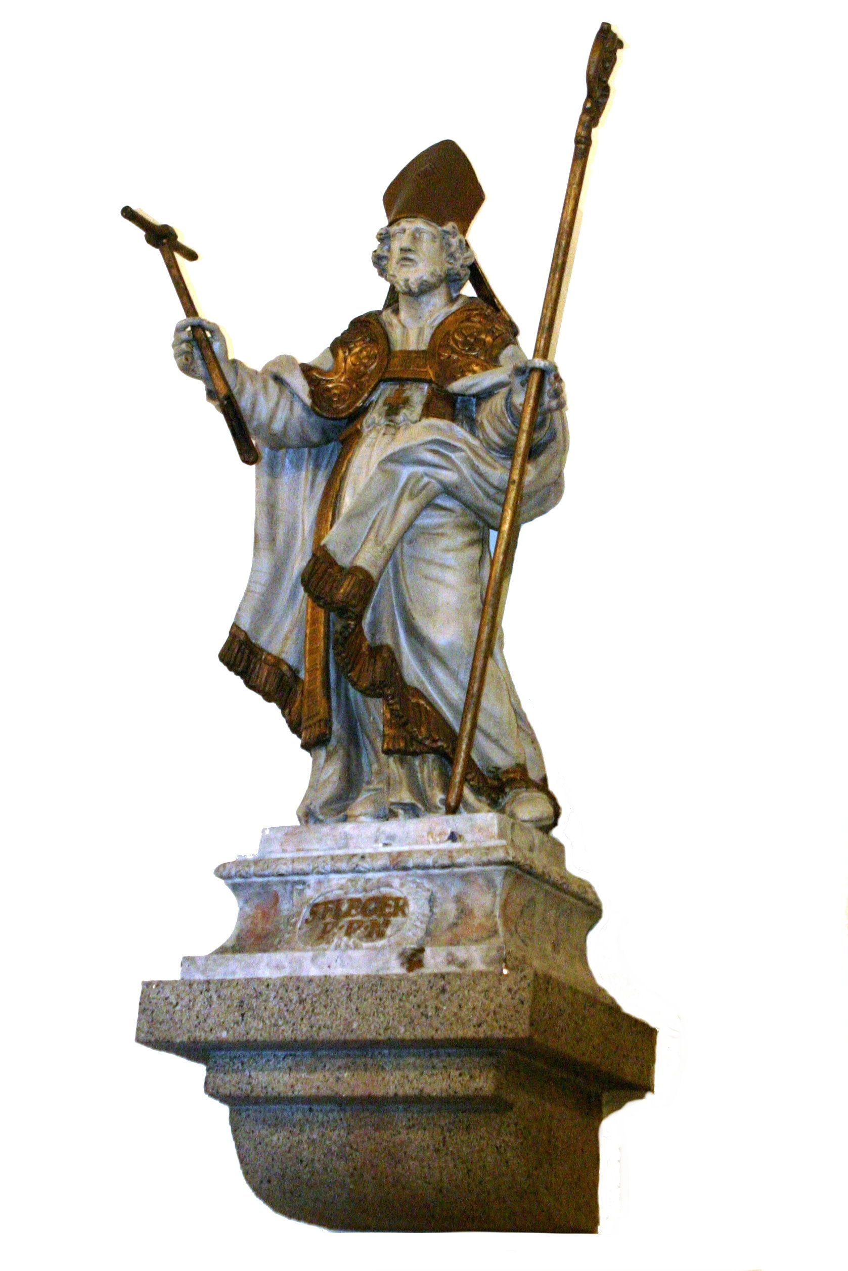 Statu vum Saint-Léger an der Kierch vun Tilff.